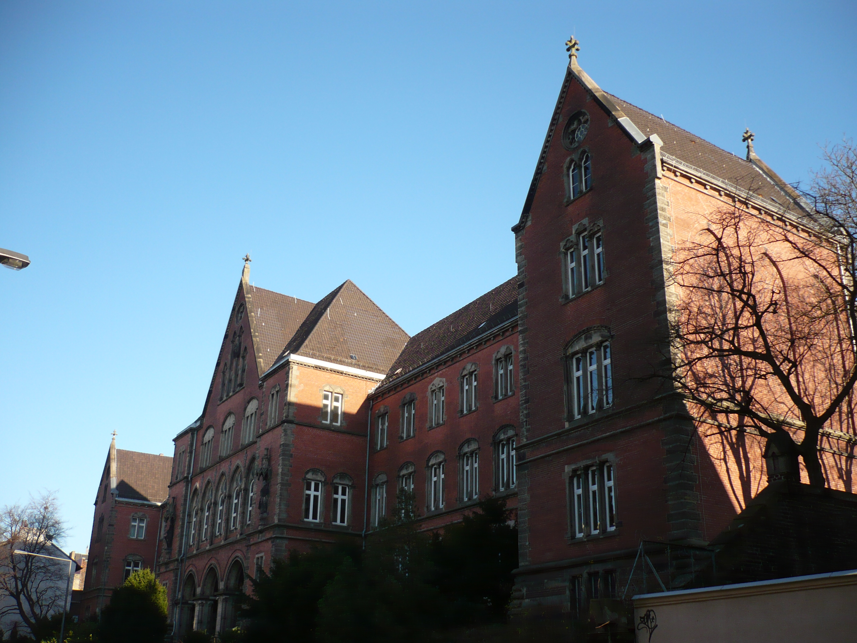 Ursprungsbau des Amts- und Landgerichts Aachen an der Kongreßstraße